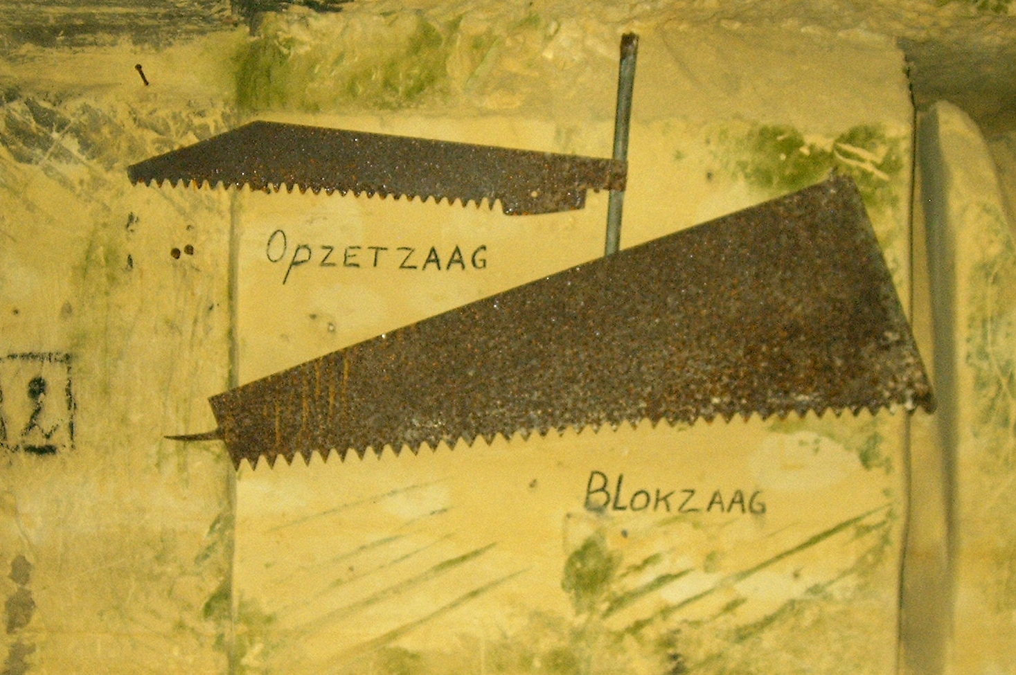 Fluweelengrot:Zagen waarmee vroeger het mergel werd bewerkt